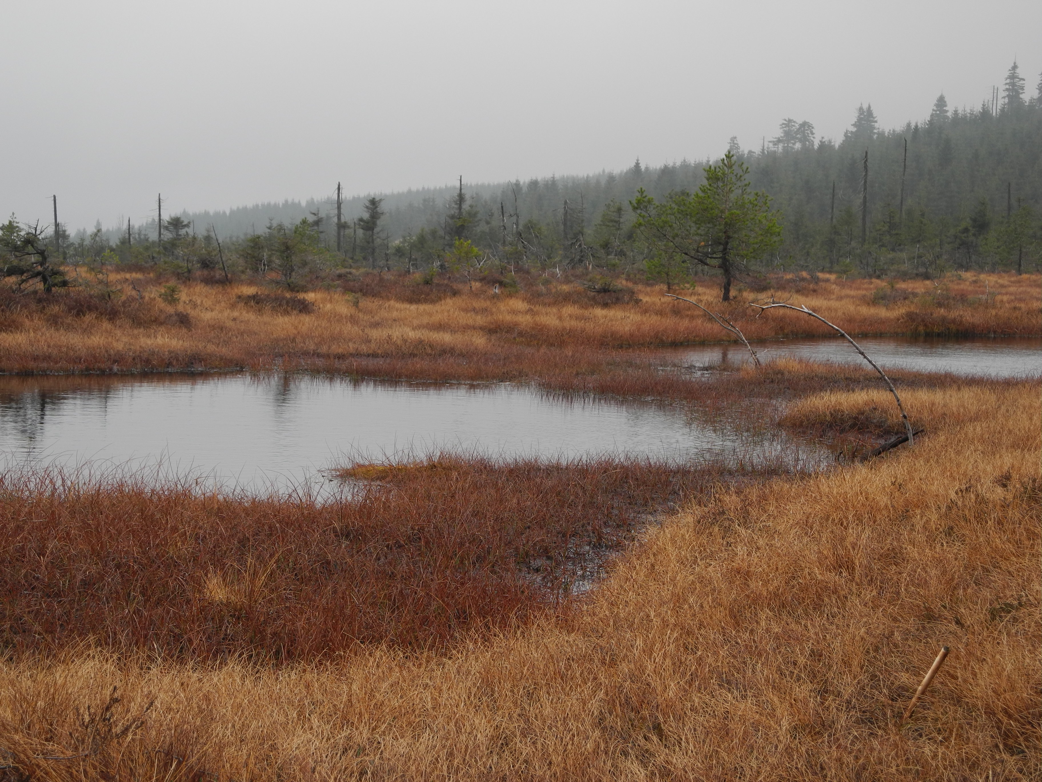 jezírka rašelinná